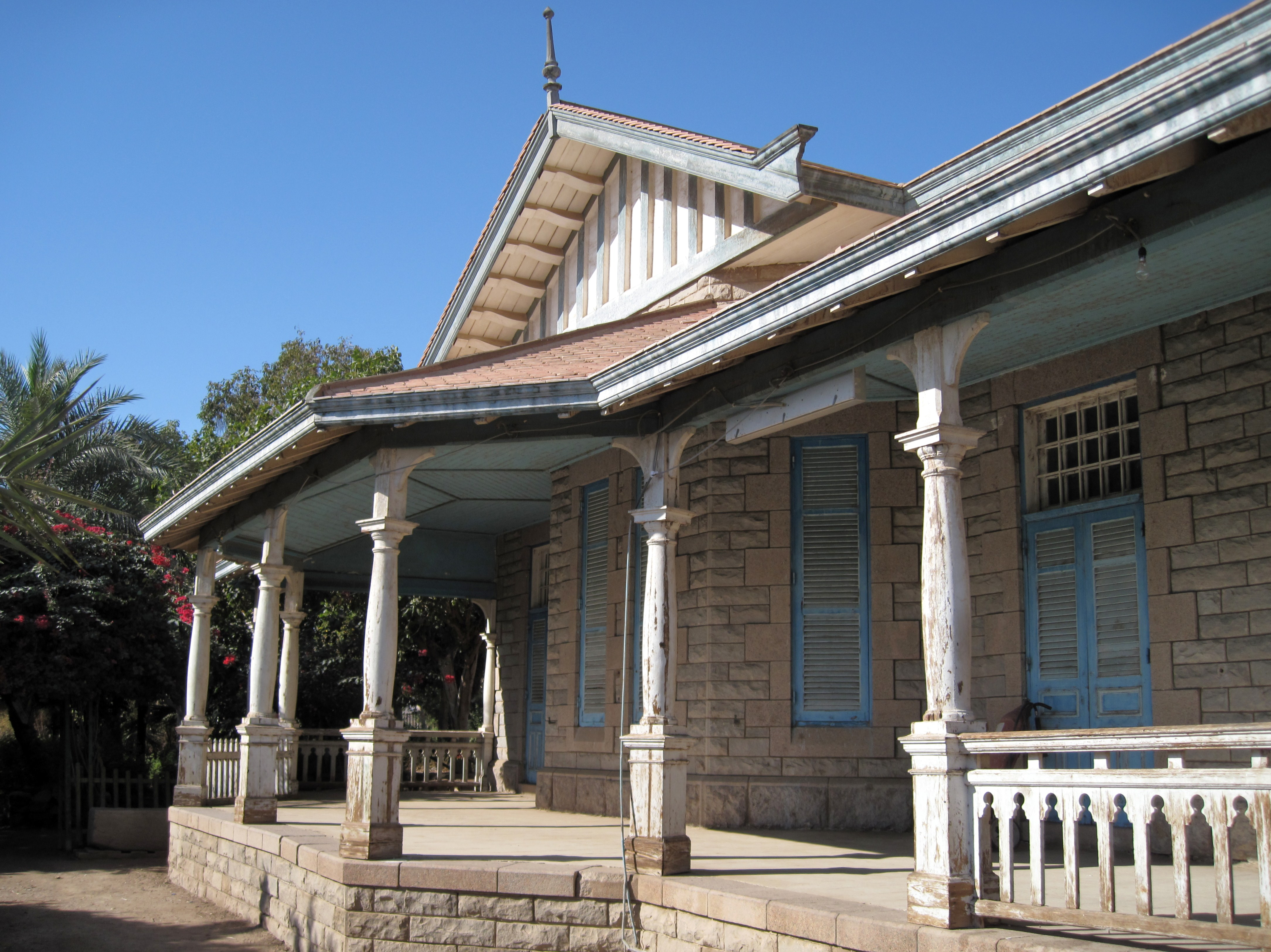 Assuan-Museum auf der Insel Elephantine, Ägypten